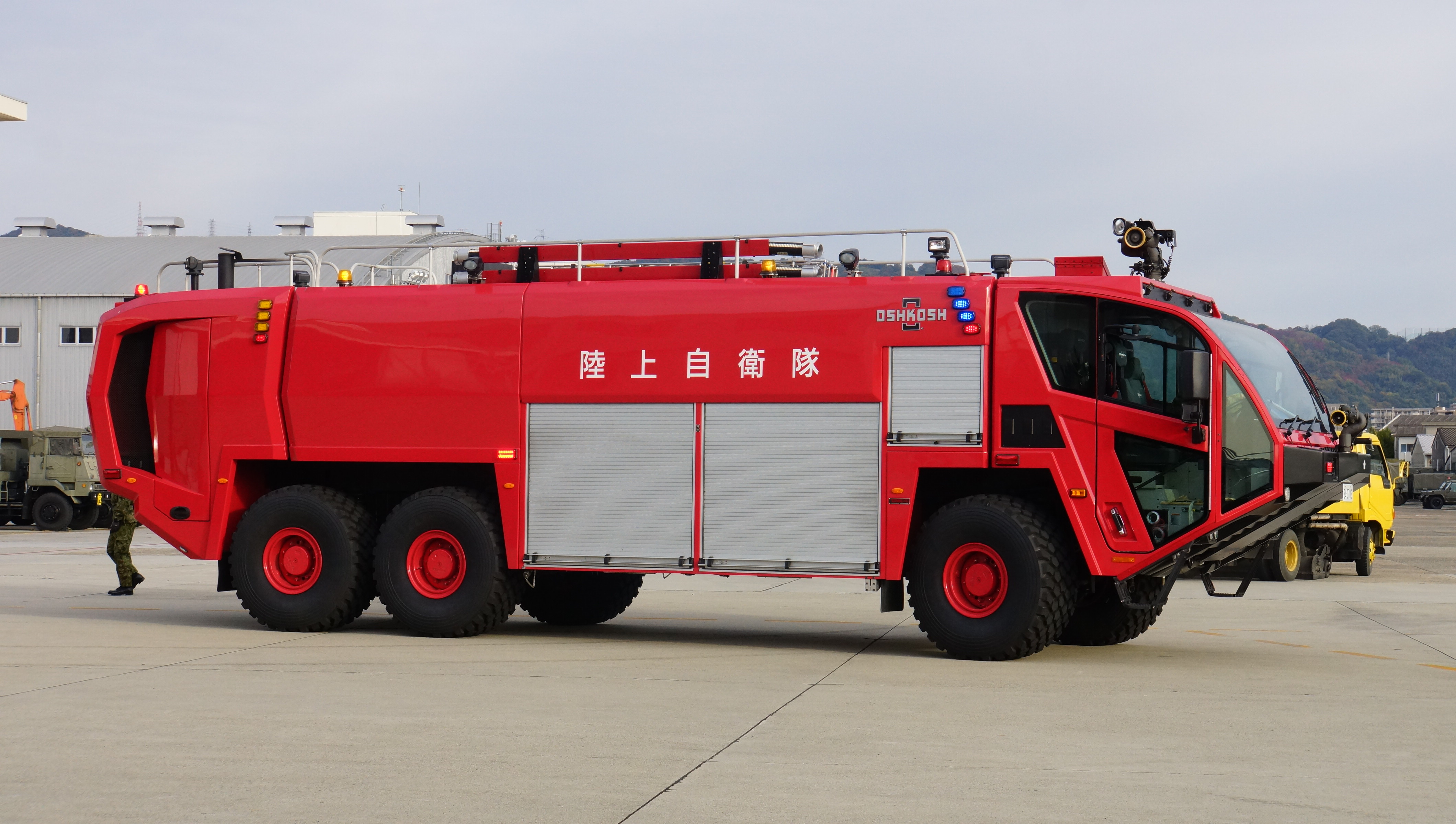 陸上自衛隊 救難消防車IB型（オシュコシュ・ストライカー3000、24-0703号車） 右前面。 2014年11月16日 八尾駐屯地にて。